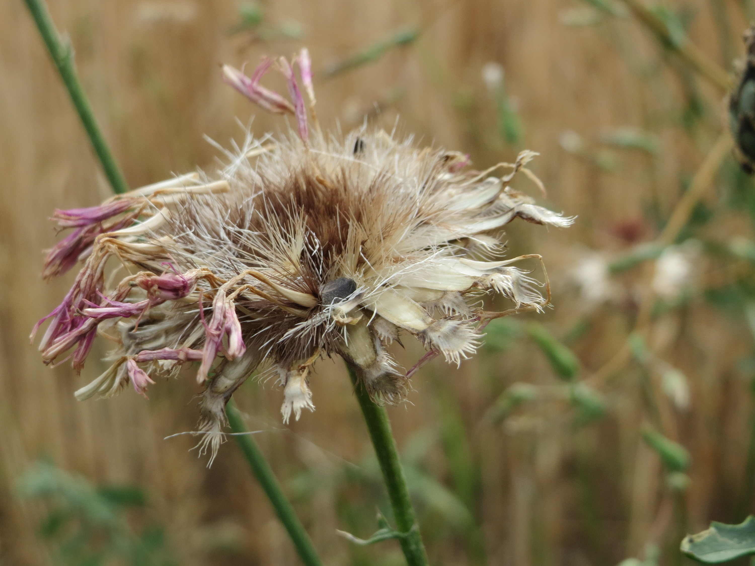 Skabiosen-Flockenblume (Centaurea scabiosa) bei Wiesbaden-Nordenstadt